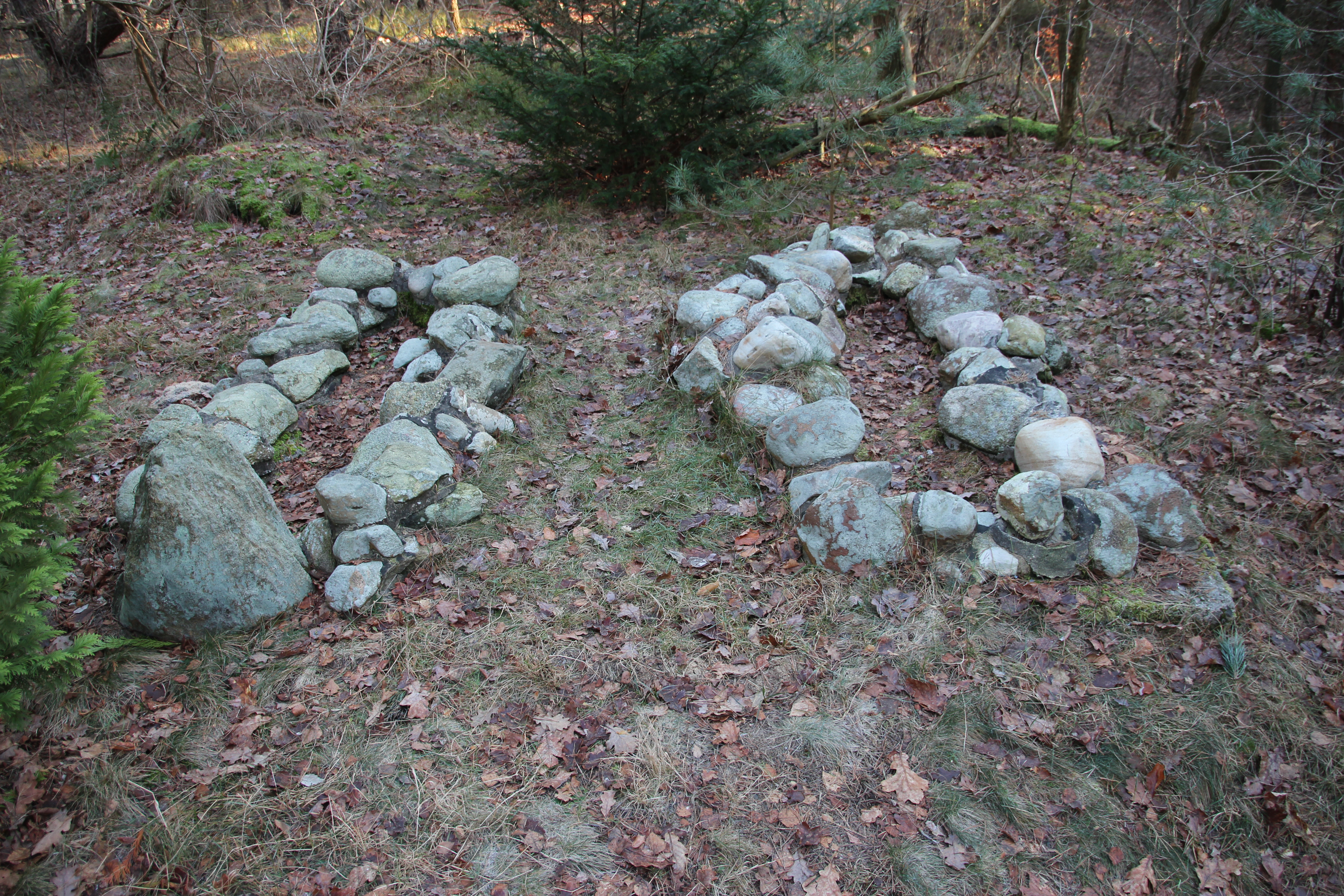 Doppelgrab der Hügelgräber in der Neegenbargsheide.